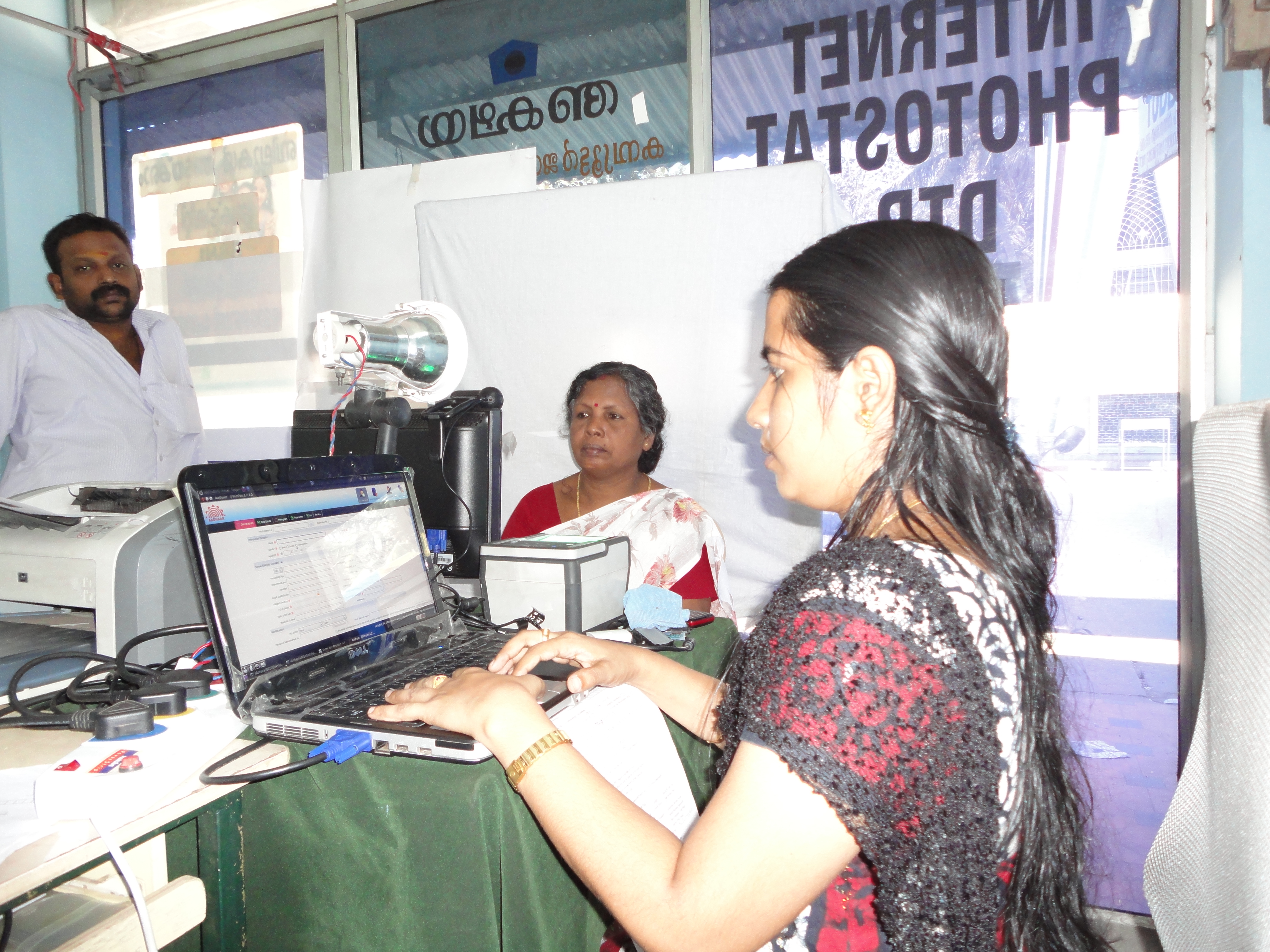 ആസൂത്രണകമ്മീഷനു കീഴിൽ എക്സിക്യുട്ടീവ് ഓർഡർ പ്രകാരം രൂപീകരിചിട്ടുള്ള യുനീക്ക് ഐഡന്റിറ്റി ആൻഡ് ഡേവലപ്പ്മെന്റ് അതോററ്റി ഓഫ് ഇന്ത്യ (യു.ഐ.ഡി.എ.ഐ.) എന്ന ഏജൻസിയാണ് ഈ പദ്ധതി നടപ്പാക്കുന്നത്.[1], വ്യക്തികളുടെ തിരിച്ചറിയൽ വിവരങ്ങൾക്കു പുറമേ വിരലടയാളം, കണ്ണിന്റെ ഐറിസ് വിവരം എന്നീ ബയോമെട്രിക് വിവരങ്ങളും ഈ പദ്ധതിയിൽ ശേഖരിക്കുന്നു.